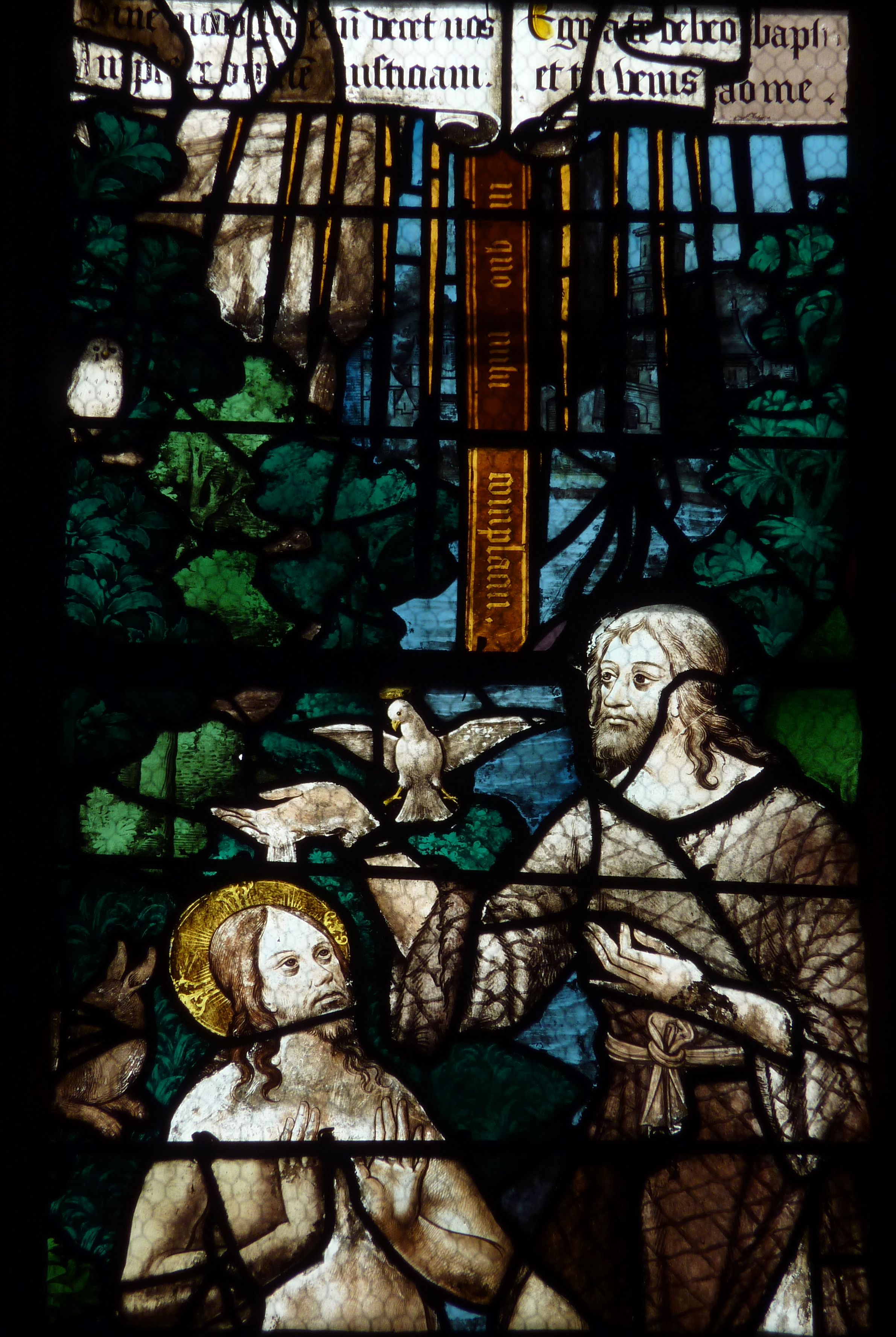 Katholische Kirche Sainte-Foy in Conches-en-Ouche im Département Eure (Haute-Normandie/Frankreich), Bleiglasfenster aus dem 16. Jahrhundert; Darstellung: Taufe Jesu (Ausschnitt)